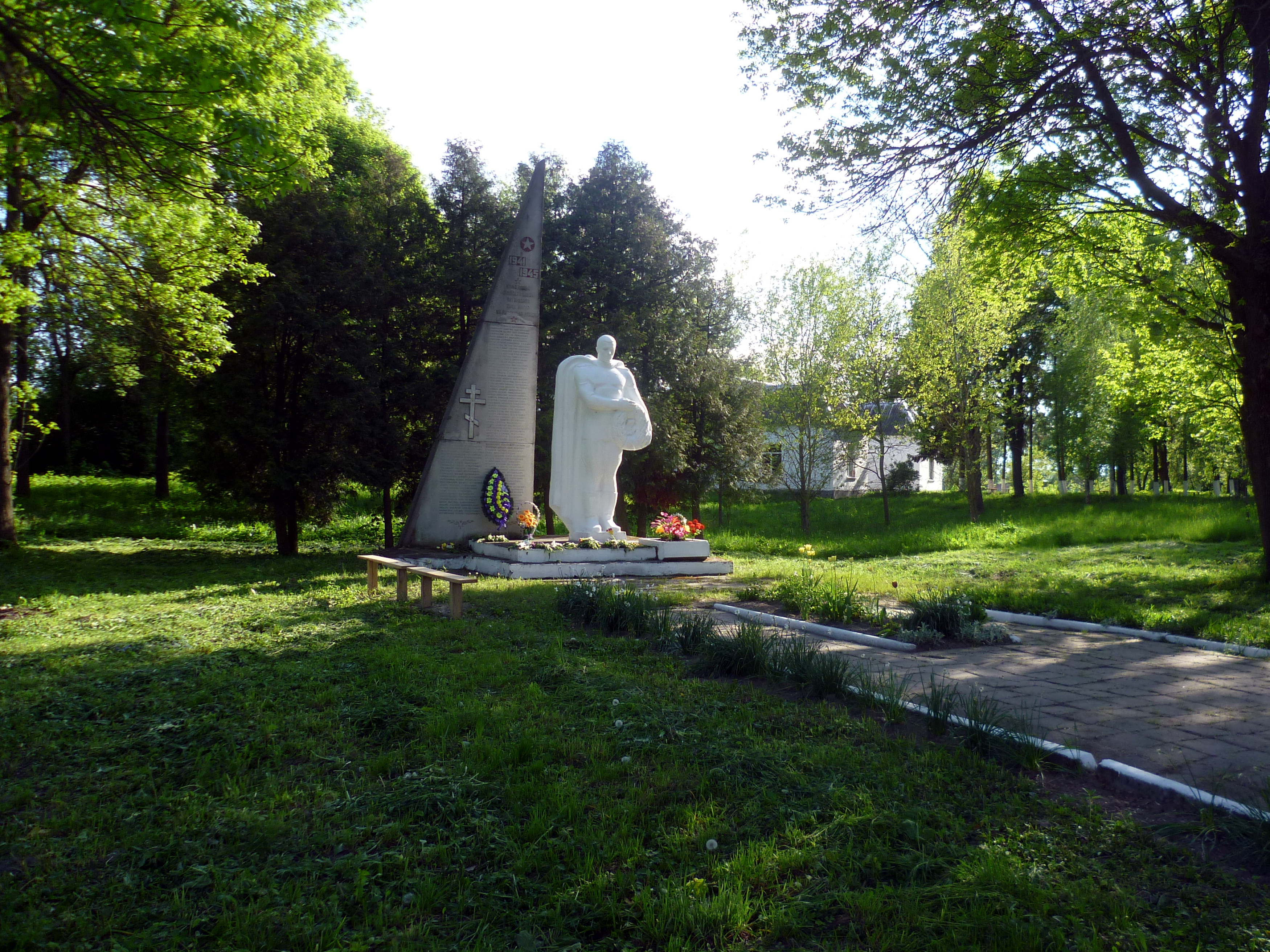 Пам’ятник землякам (1972 рік) - загальний вигляд з дороги - с.Стенжаричі Володимир-Волинський район Волинська область Україна